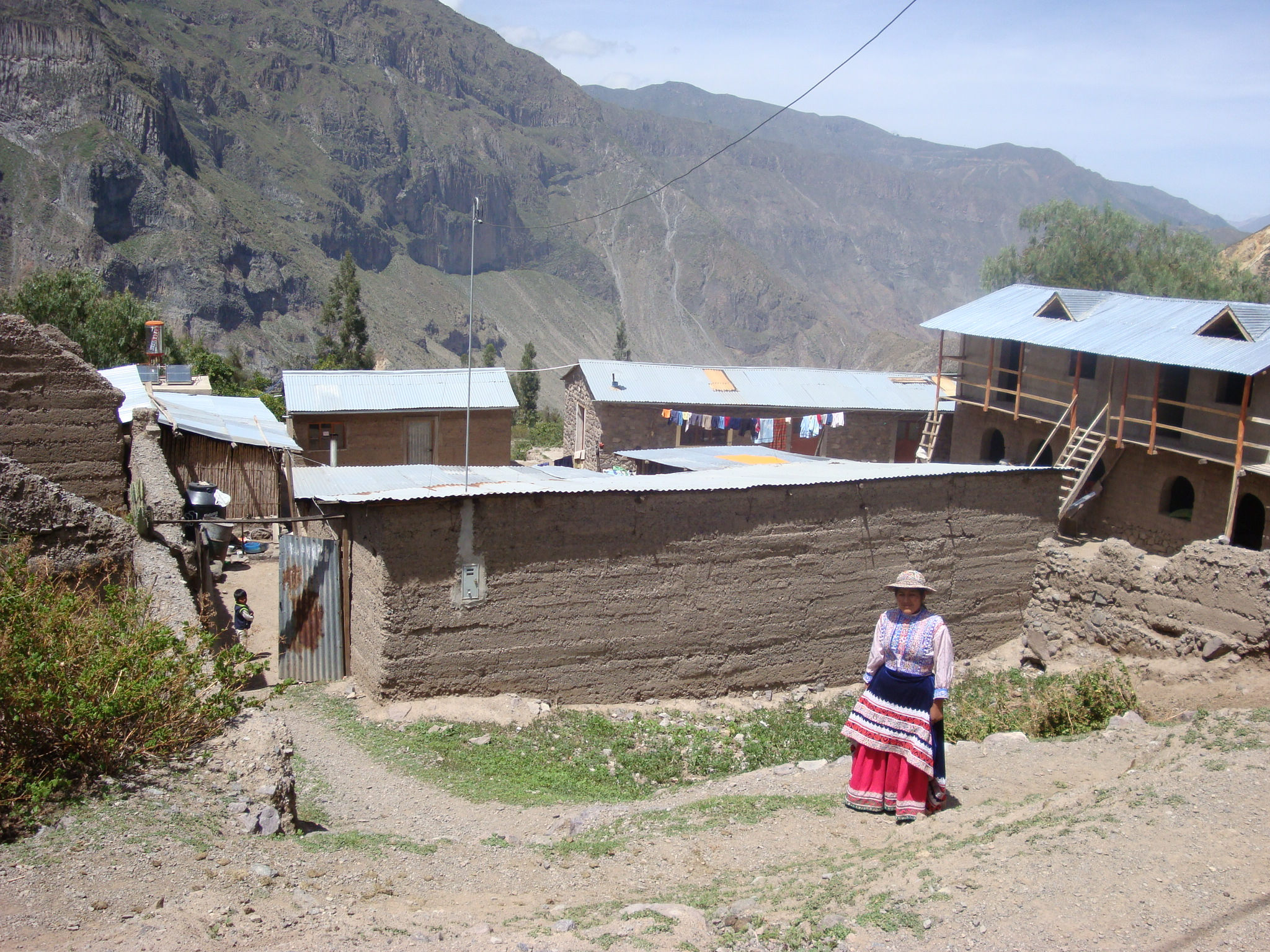 COSÑIRHUIÑA